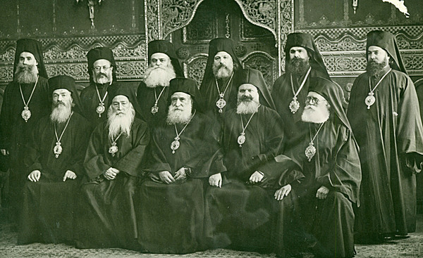 От ляво на дясно, седнали: митрополитит Скопски Неофит, митрополитит Пловдивски Максим, митрополитит Видински Неофит, екзарх Български Стефан митрополит Сливенски Иларион. Прави от ляво надясно: митрополит Неврокопски Борис, митрополит Доростоло-Червенски Михаил, митрополит Старозагорски Павел, митрополит Врачански Паисий, митрополит Търновски Софроний епископ Стобийски Кирил, главен секретар на Светия синод.